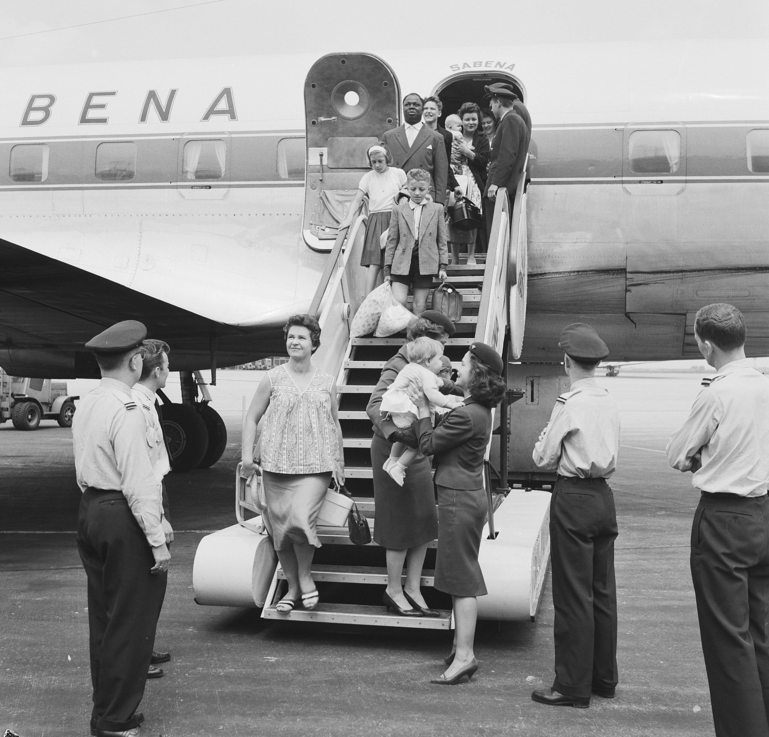 Collectie / Archief : Fotocollectie Anefo Reportage / Serie : [ onbekend ] Beschrijving : Evacuatie uit Belgisch Congo te Brussel vliegveld Zavente Datum : 20 juni 1960 Locatie : Brussel, Congo, Zaventem Trefwoorden : EVACUATIES, vliegvelden Fotograaf : Behrens, Herbert / Anefo Auteursrechthebbende : Nationaal Archief Materiaalsoort : Negatief (zwart/wit) Nummer archiefinventaris : bekijk toegang 2.24.01.03 Bestanddeelnummer : 911-3493